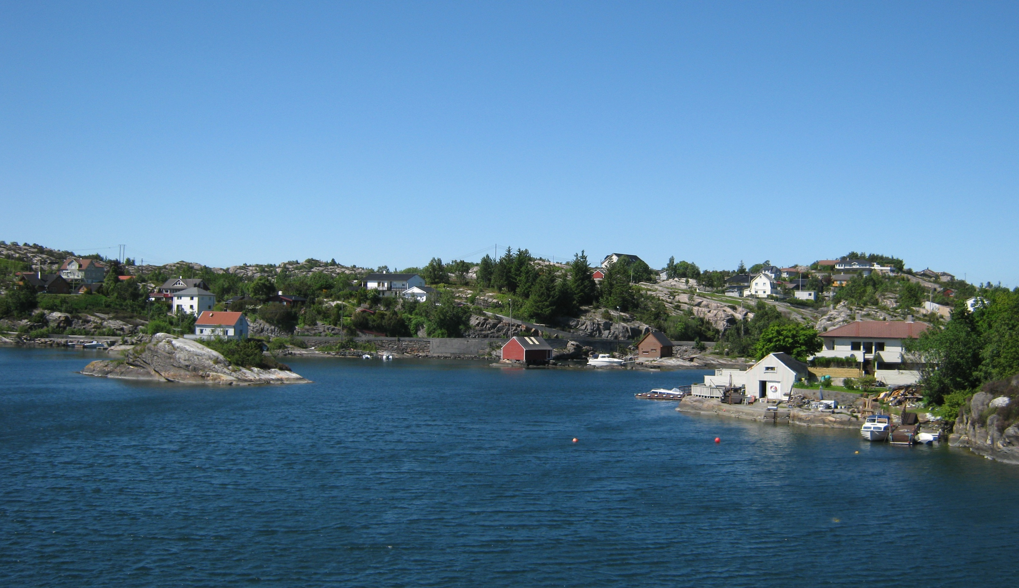 Parti fra Hanøy, Askøy kommune